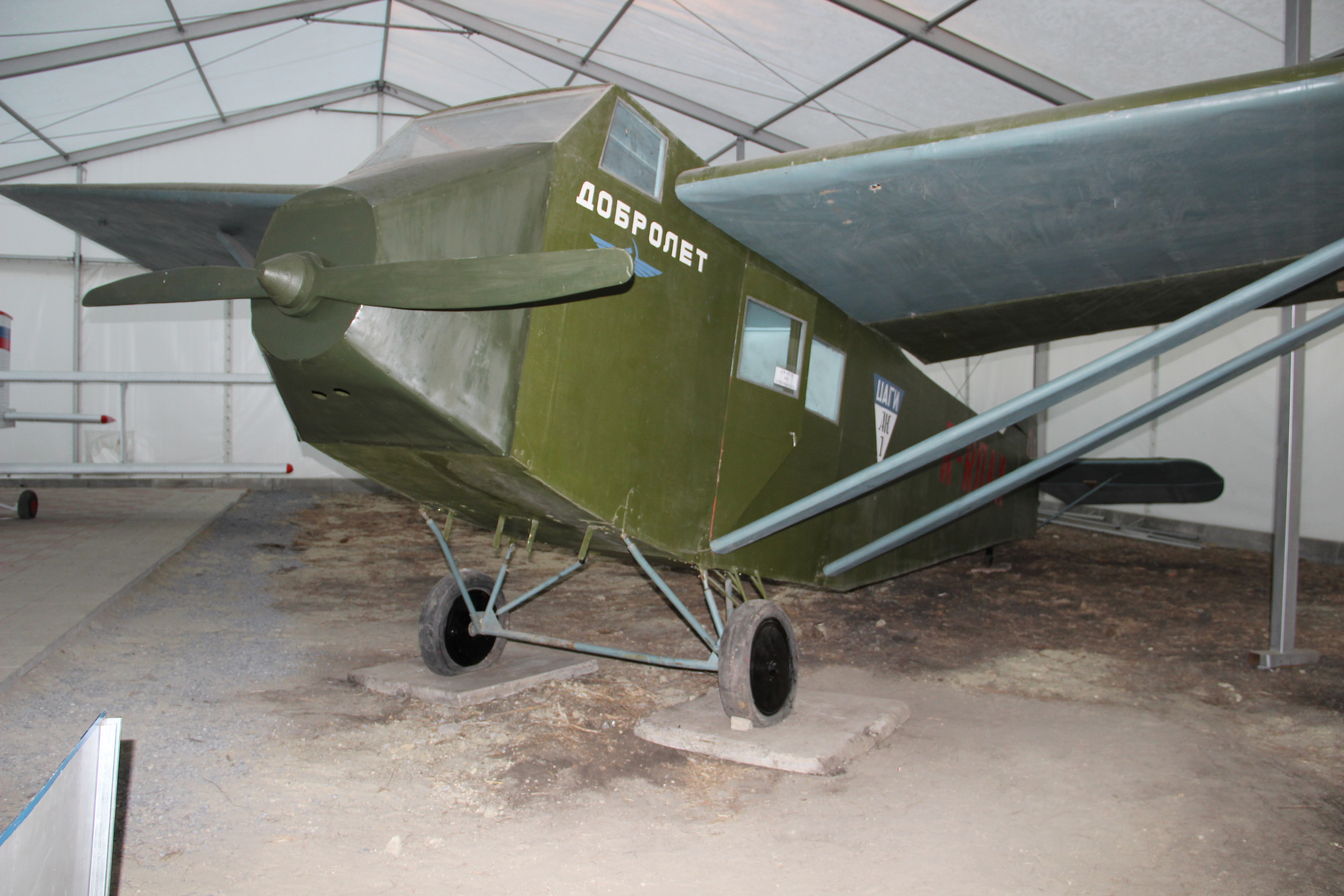 Единственный АК-1 "Добролет". Ангар. Музей гражданской авиации. Ульяновск. Ноябрь 2013